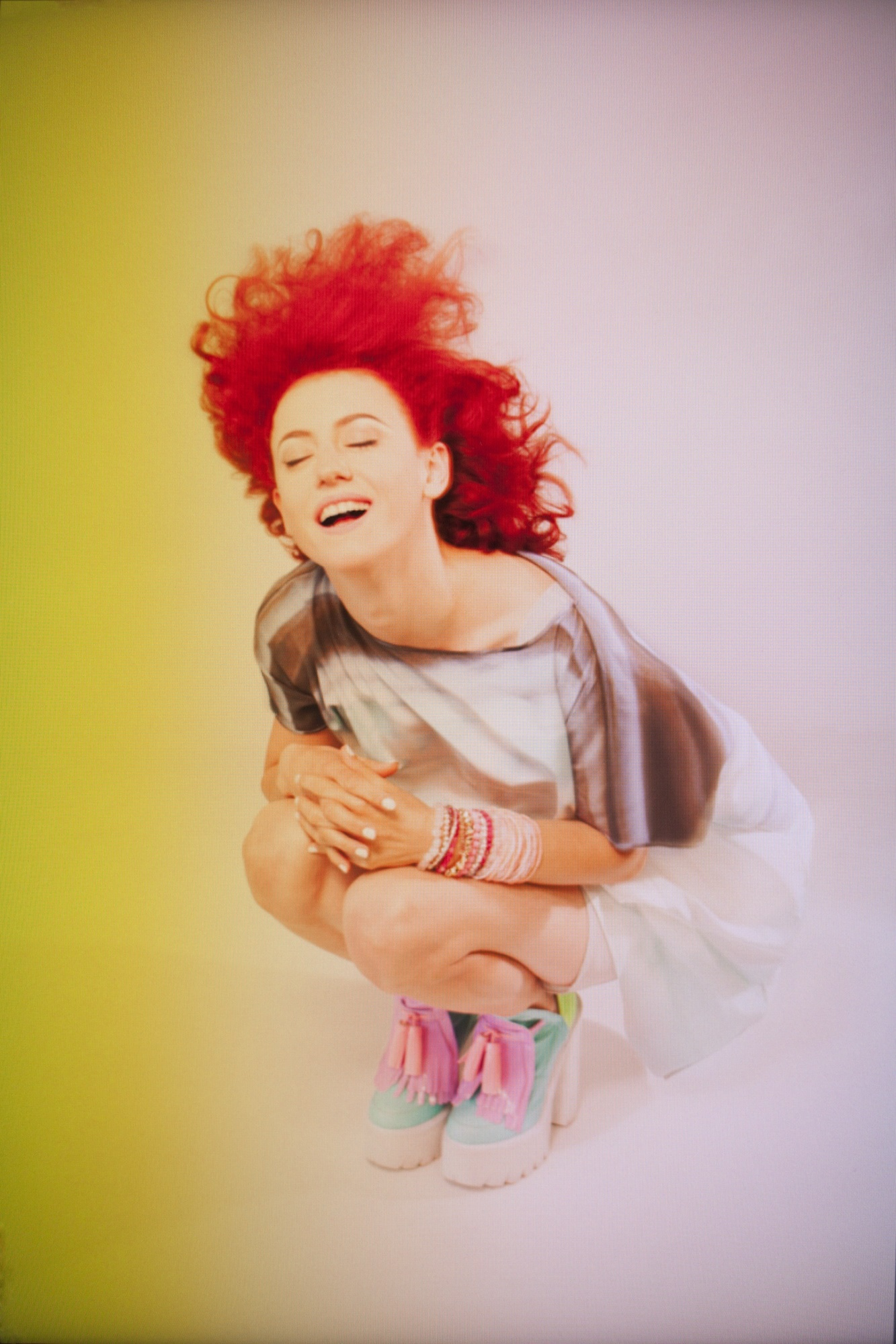 MarieMarie 20140713_0038.jpeg